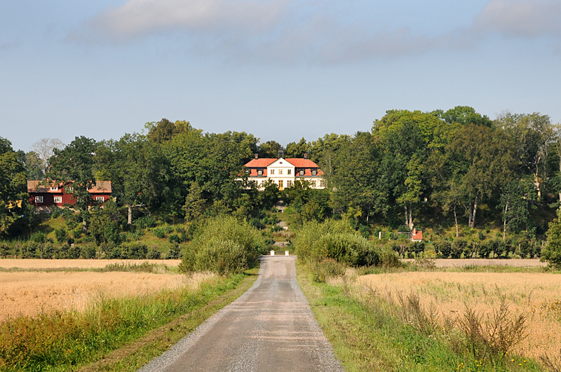 Berga-Tuna herrgård i Nyköpings kommun, Södermanland.